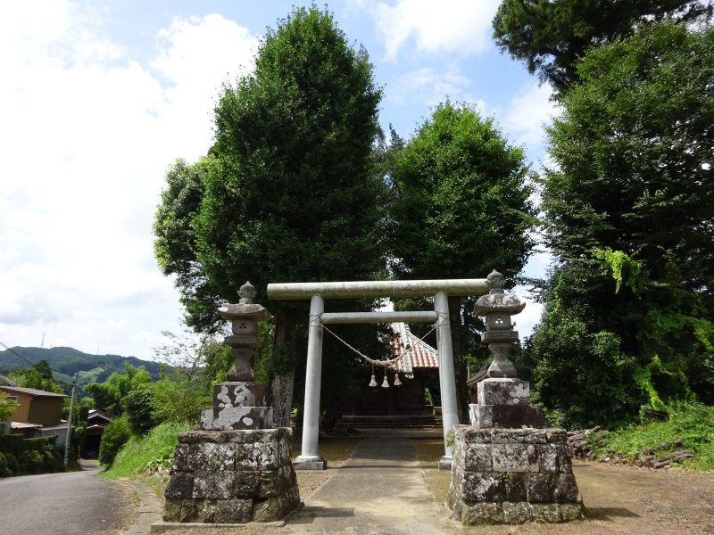 大多喜町筒森神社